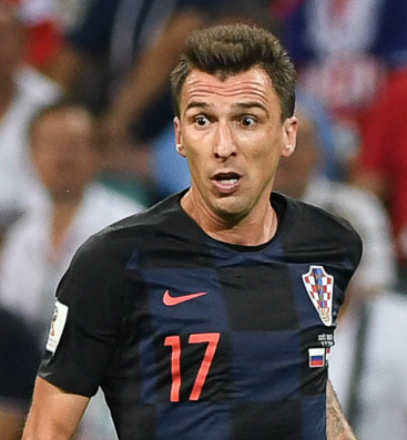 Сборная России заканчивает ЧМ-2018 с поднятой головой. Хорватия выходит в полуфинал